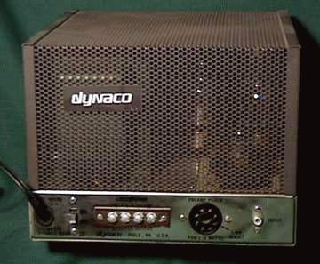 En gång det kraftfullaste som fanns på marknaden - Dynaco Mark III Monophonic Power Amplifier